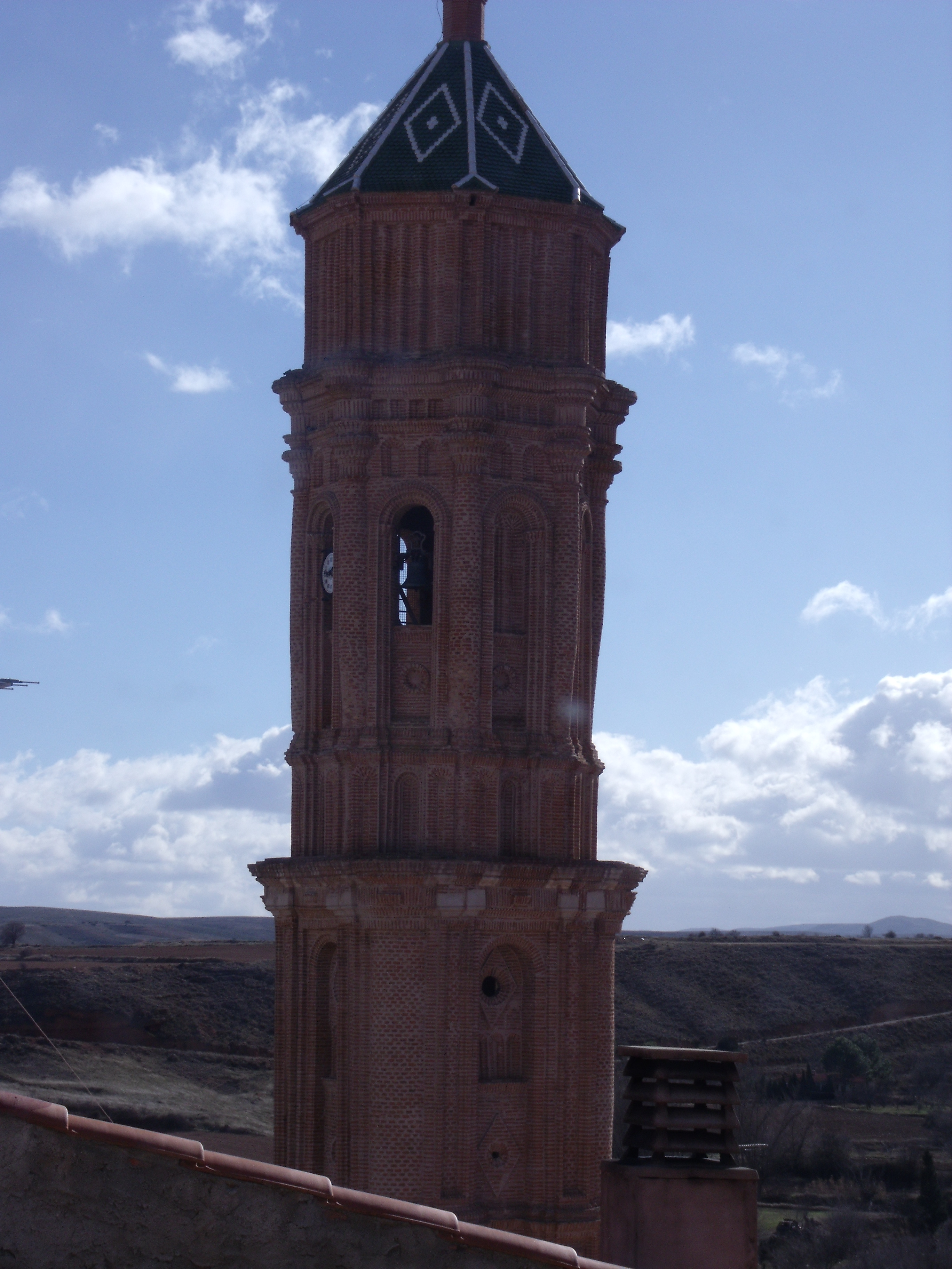 Torre de la Iglesia de Plenas